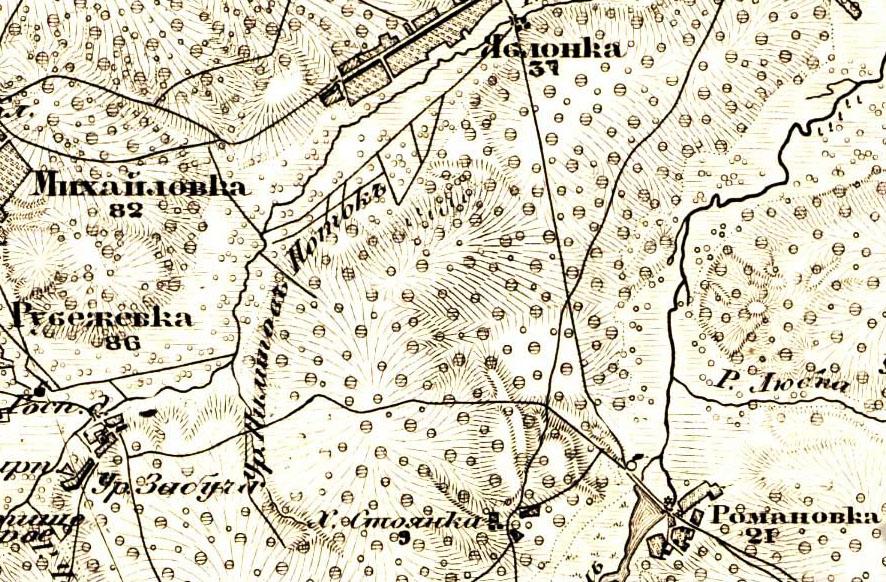 Пилипів Потік на карті Федора Шуберта, 1863